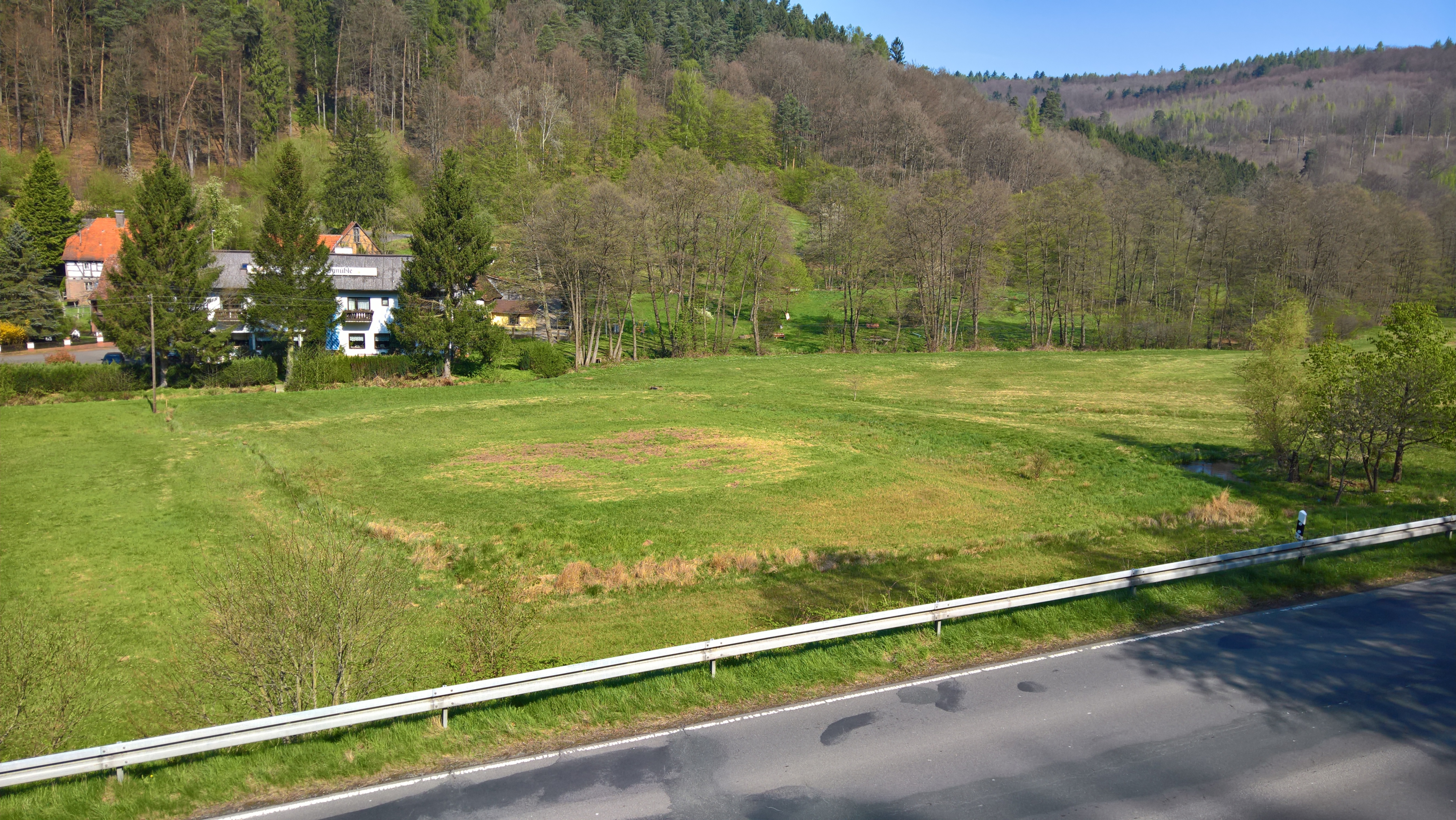 Dammbach, Burgstall Unterschorrhof, auch Schloss Herbroch genannt; die Quelle rechts im Bild sichtbar